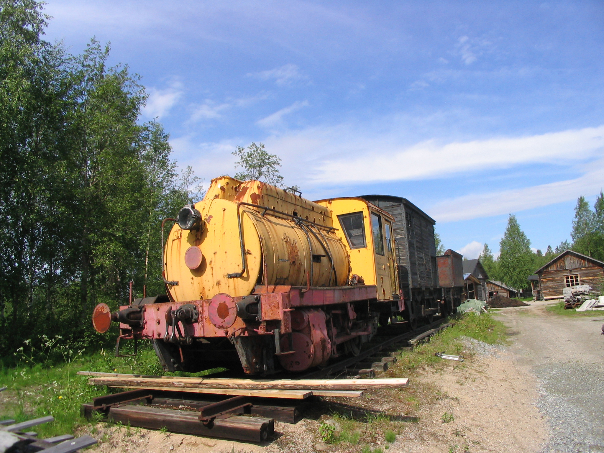 Pankakosken tehtaiden Porter-höyrysäliöveturi